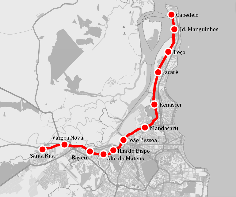 Mapa da linha central do trensurb de João Pessoa.